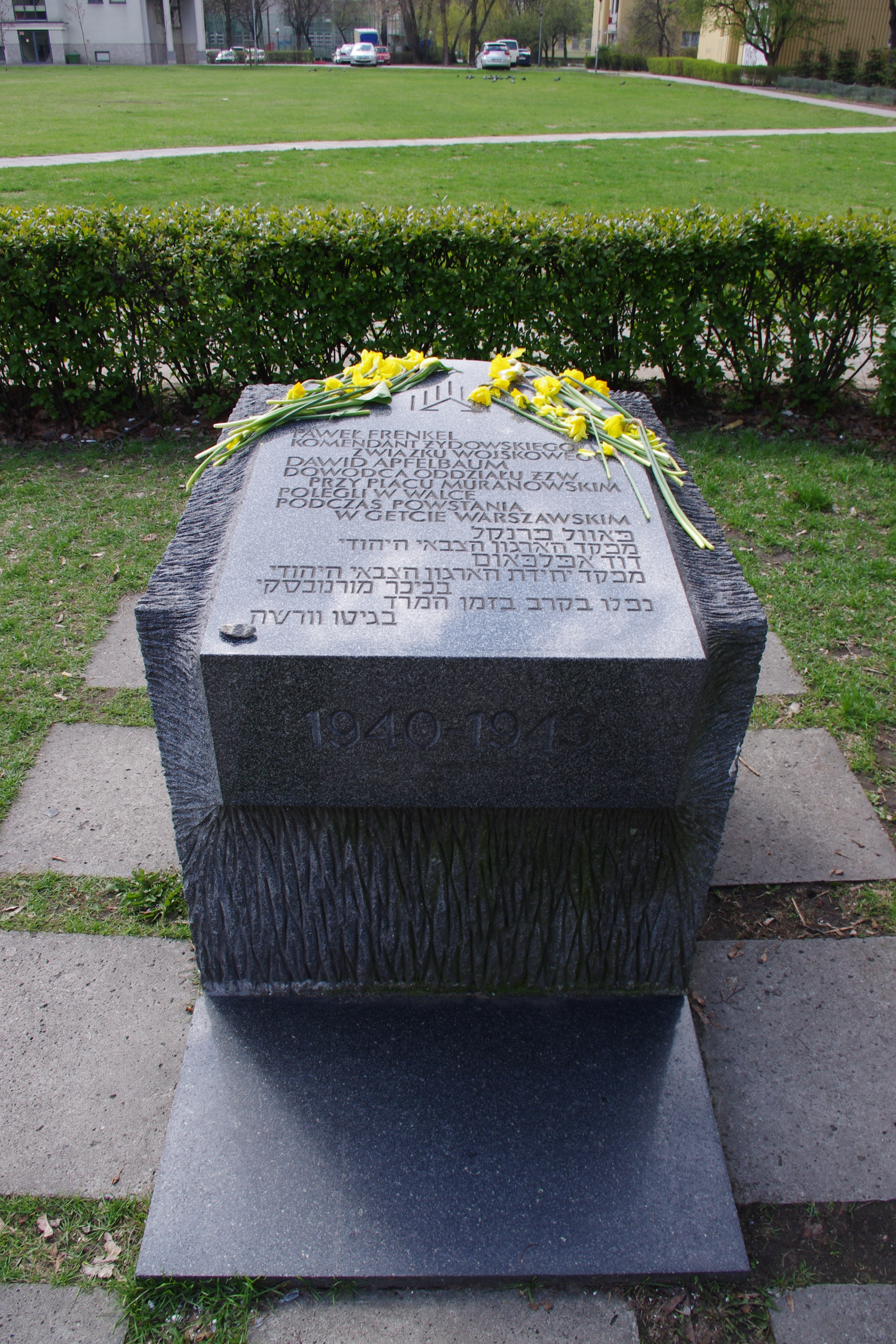 Kamień upamiętniający dowódców ŻZW w getcie warszawskim - Pawła Frenkela i Dawida Moryca Apfelbauma na ul. Dubois w Warszawie